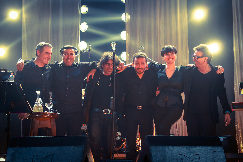 Arisa, Giuseppe Barbera e gli altri musicisti durante l'Amami Tour 2012, data zero a Santa Margherita Ligure (Genova)